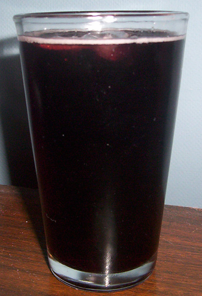 Autor: Antoine Tema: Jote